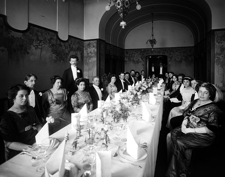 Grupp från Bonniers bokförlag vid middagsbord i Stockholm, möjligen Nedre Manilla I bilden märks bla (sittande från vänster) Yngve Larsson (2:a), Lisen Bonnier (4:e) och Karl-Otto Bonnier (9:e).